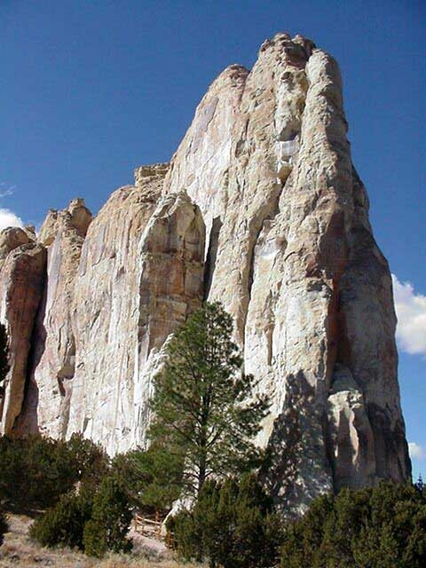 El Morro National Monument